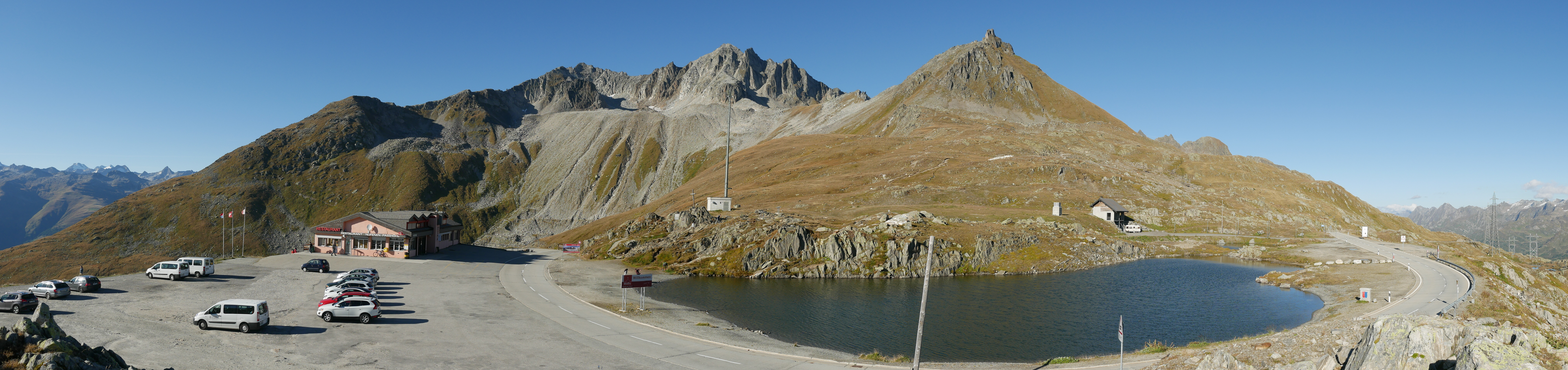 Nufenen Passhöhe Panorama mit See